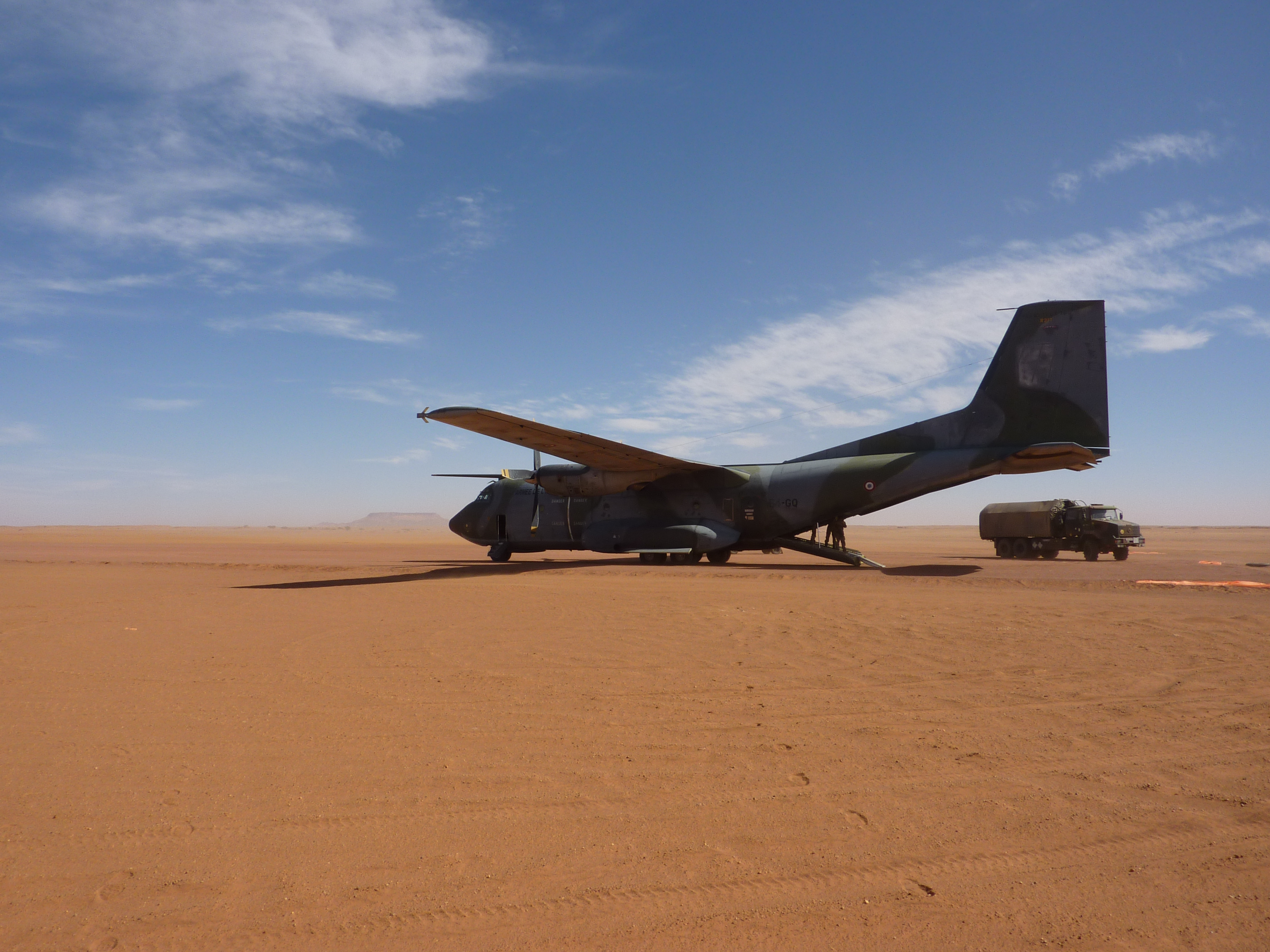 Avion de transport tactique C-160 Transall de l'armée de l'air française sur la piste de Madama au Niger, 1er janvier 2015